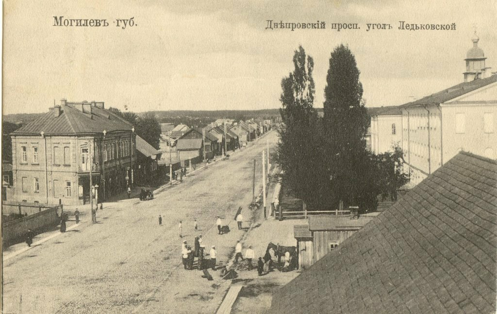 Дняпроўскі праспект, рог Ледзькаўскай